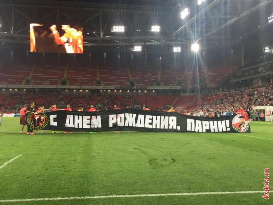 Игроки "Спартака" поздравляют Union и "Школу" с юбилеями